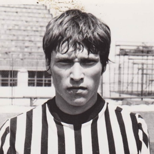 Teodor Anghelini